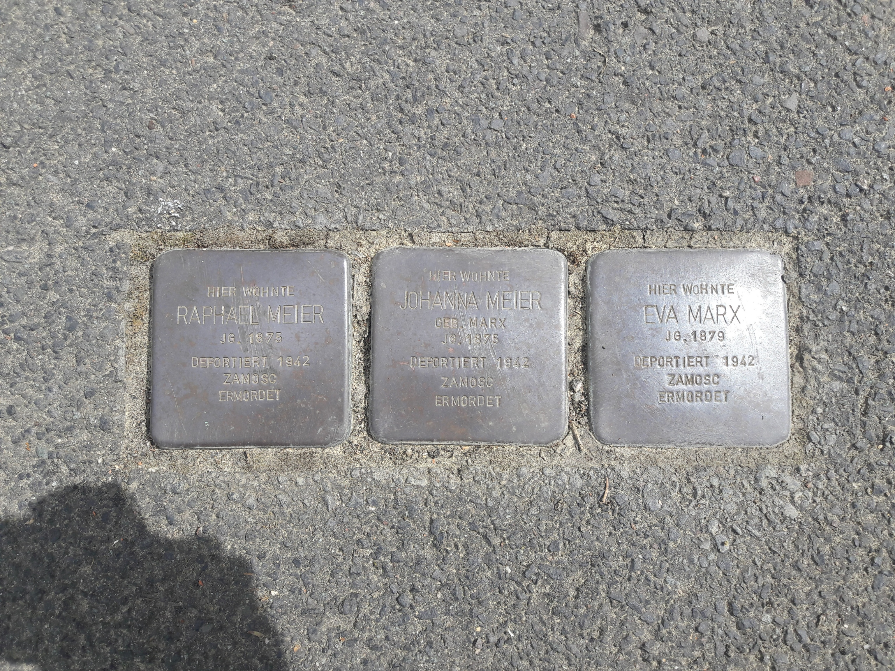 Stolpersteine Grubenstraße 2, Kreuztal-Littfeld